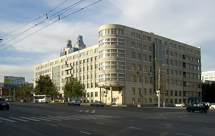 Здание администрации Новосибирской области